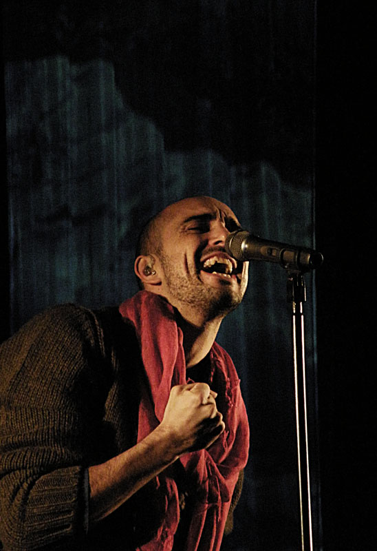 Abel Federico Pintos (Bahía Blanca, 11 de mayo de 1984) es un cantante y compositor argentino de folclore y pop latino. Comenzó su carrera musical a los siete años, al ser escuchado por Raúl Lavié en un homenaje a San Martín realizado en su colegio.